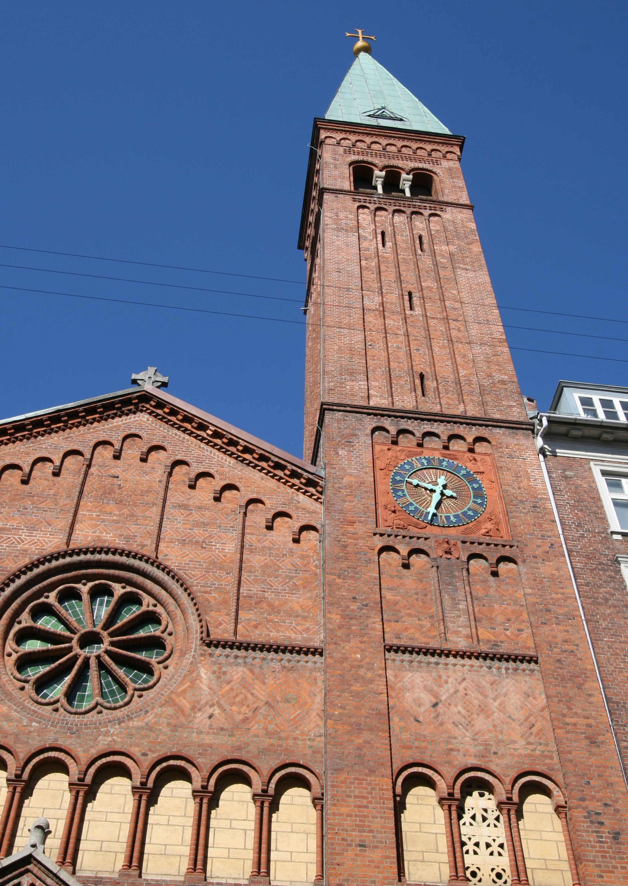 Nazaret Kirke, Østerbro, Denmark. Belfry